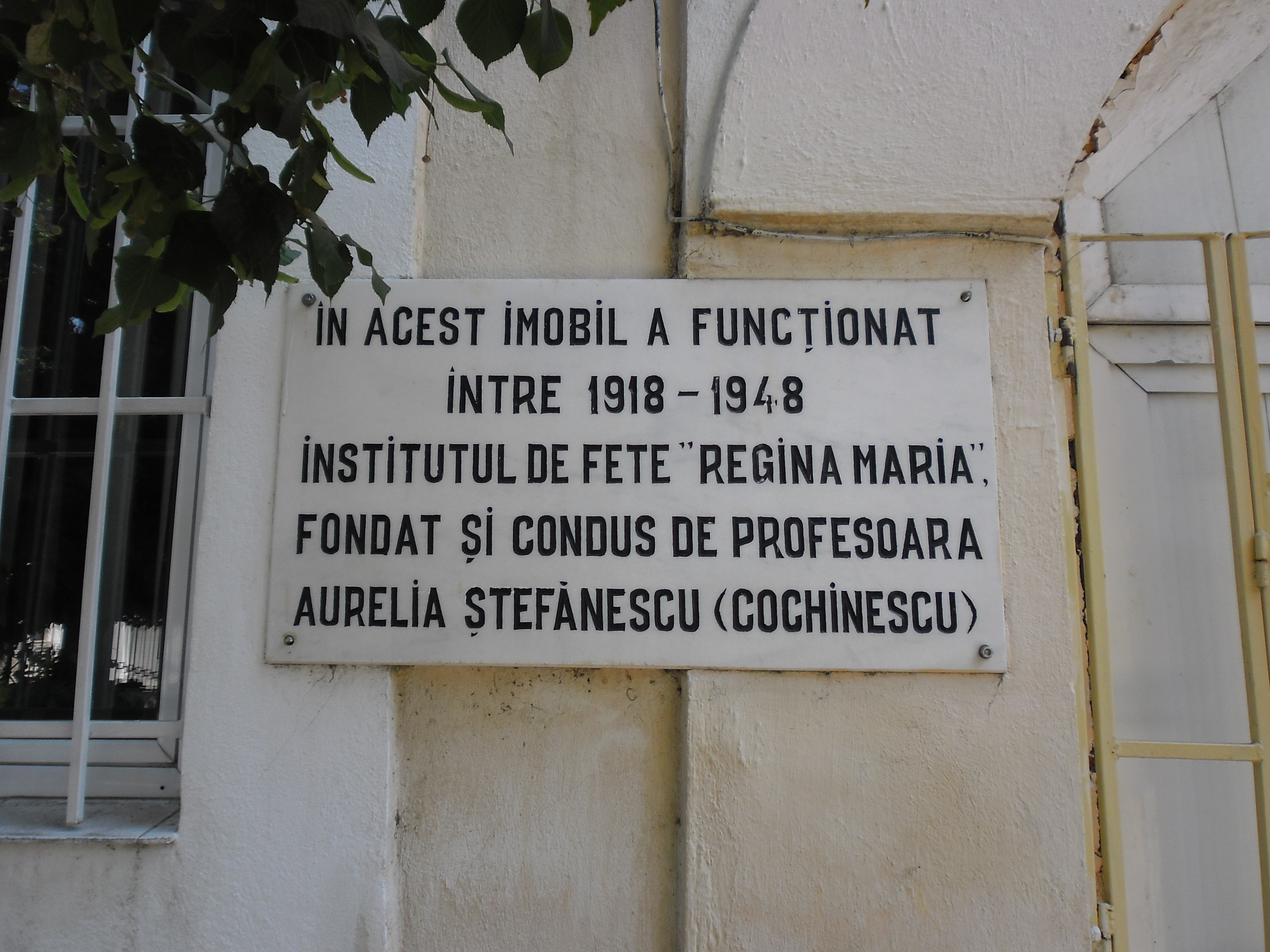 Institutul de Fete "Modern", azi Inspectoratul școlar